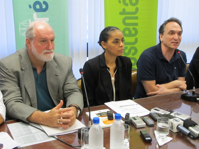 Com Ricardo Young e Fábio Feldman